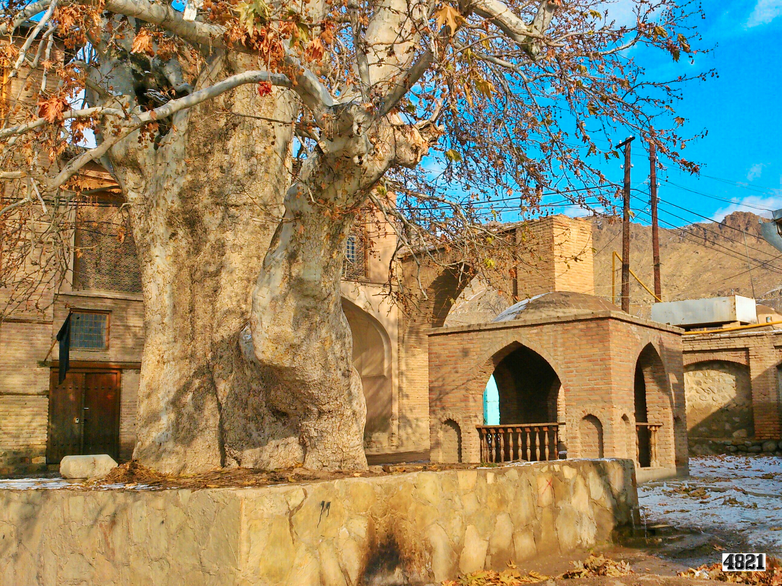 ordubad